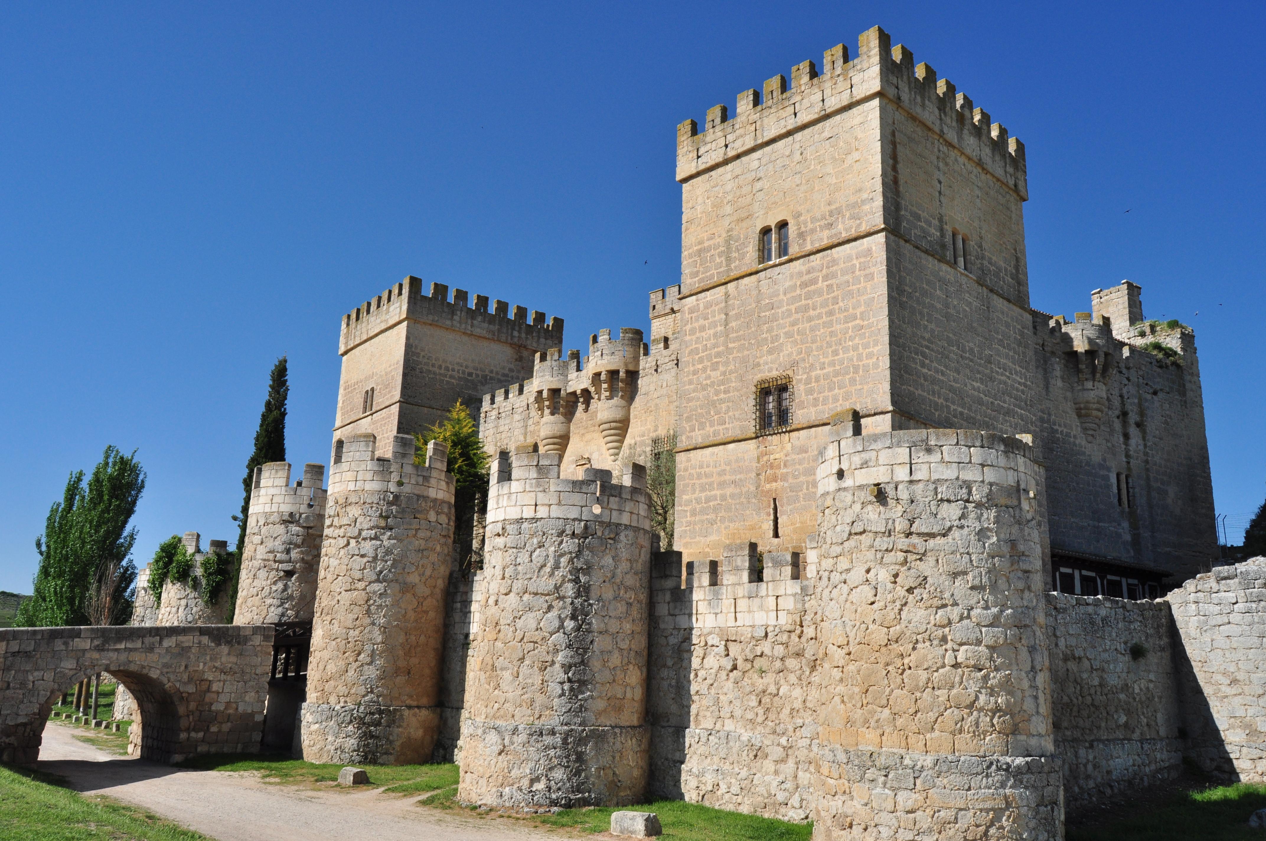 Ampudia - 004